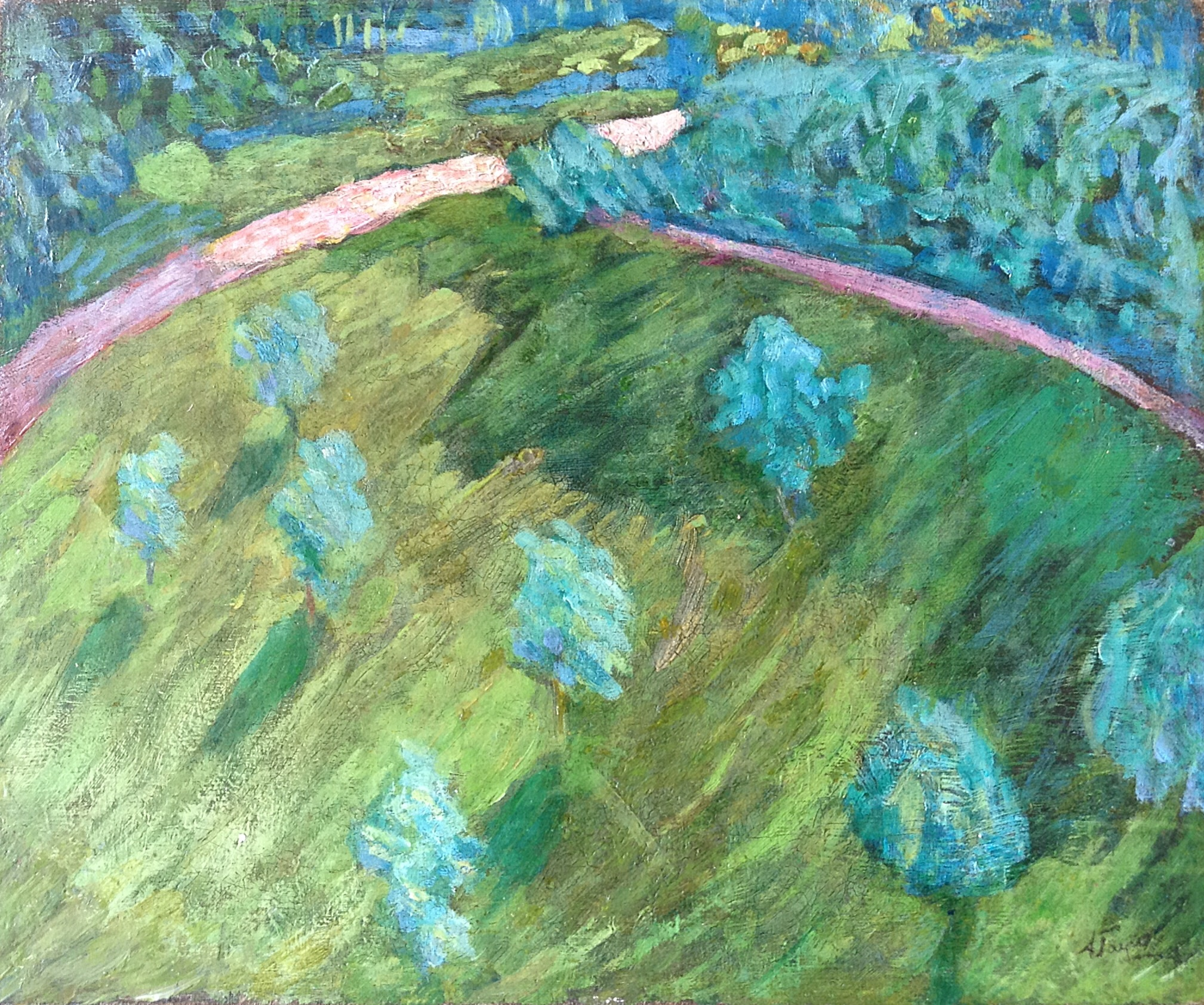 Гауш А.Ф. "Майское утро", 1908, холст,масло, 35х42, эскиз к работе "Майское утро" (в собрании Русского музея). Работа находится в частном собрании.